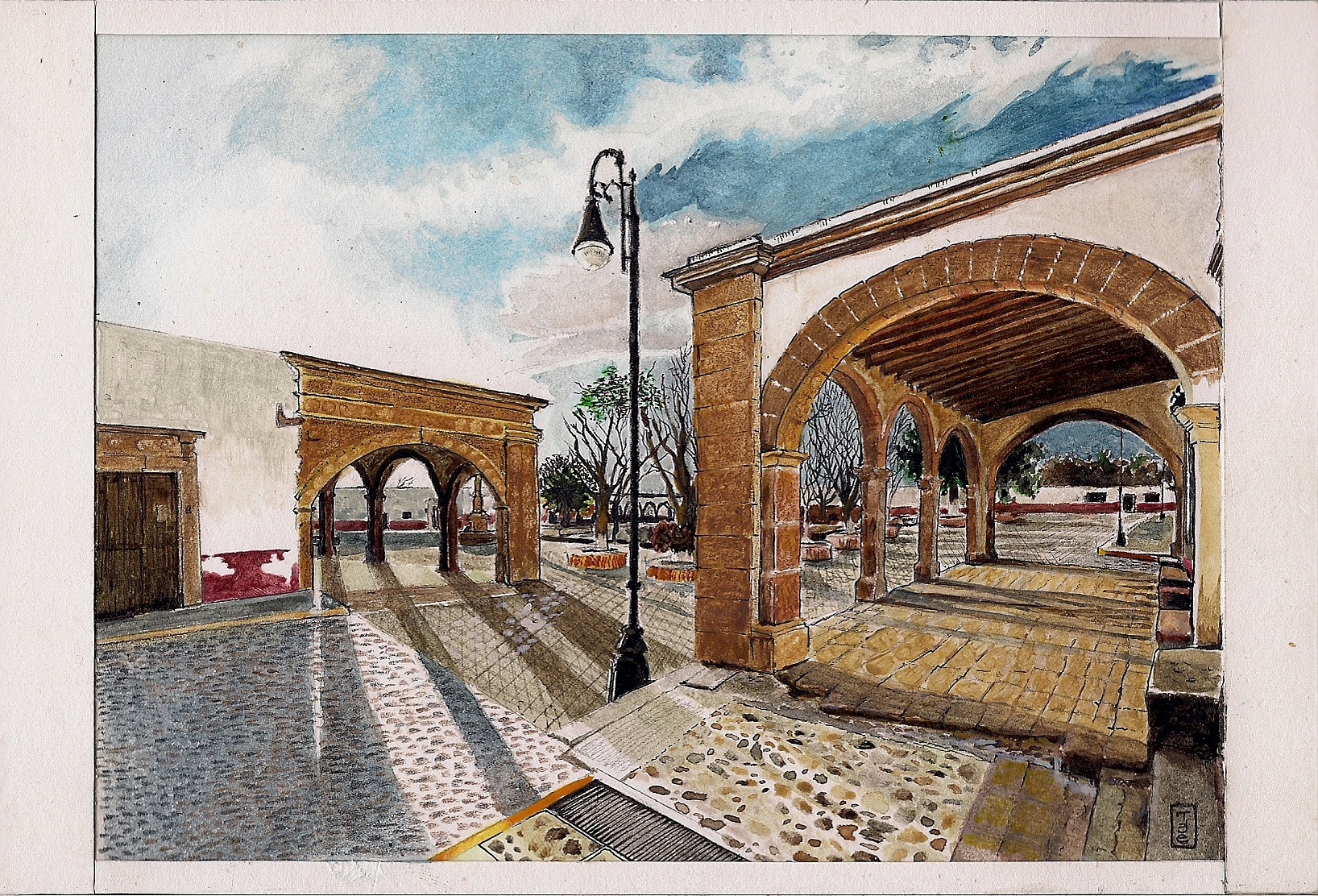 Miniatura en acuarela de la plaza central de Nopala de Villagrán